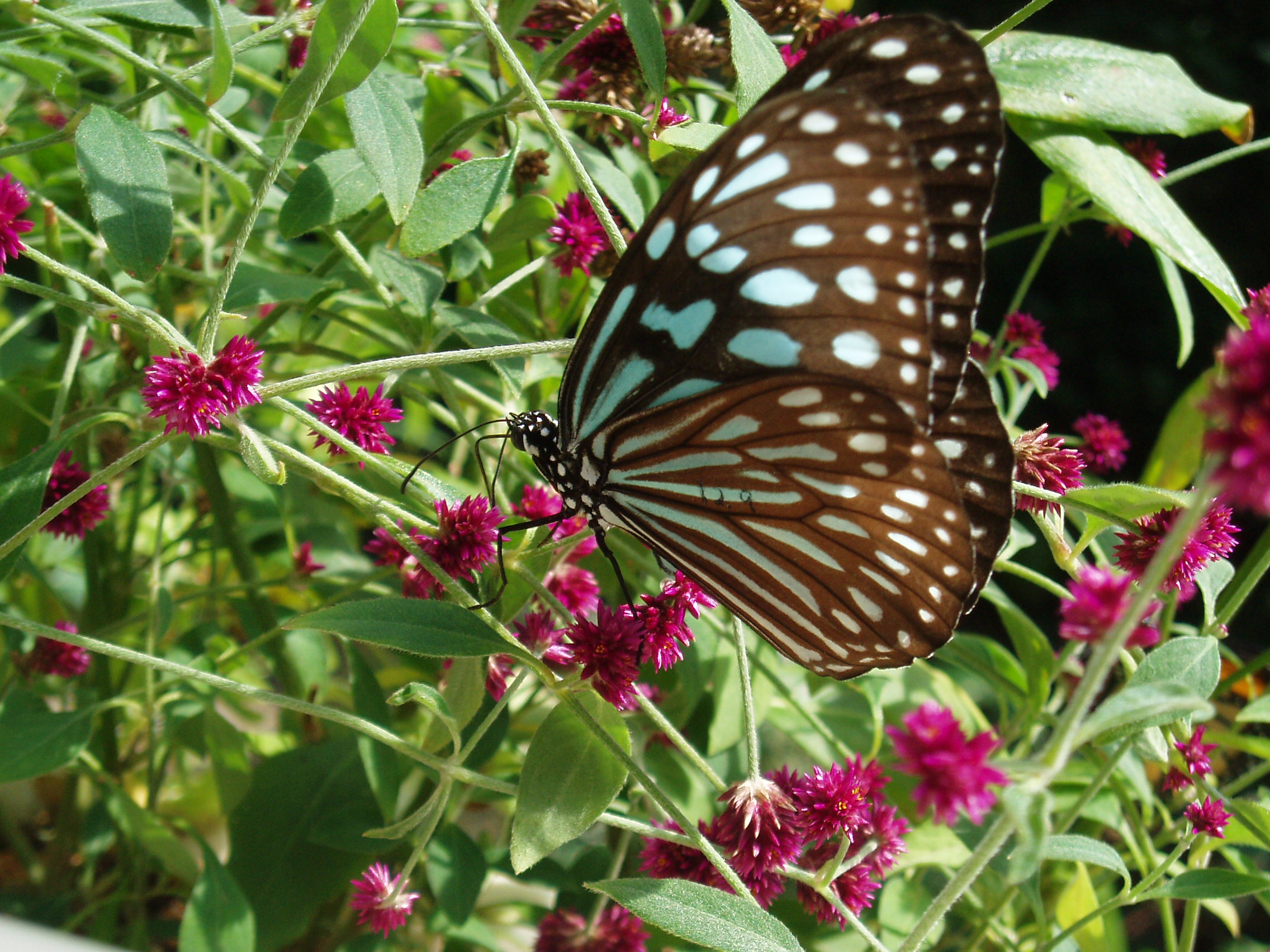 Ideopsis similis, Mino, Osaka